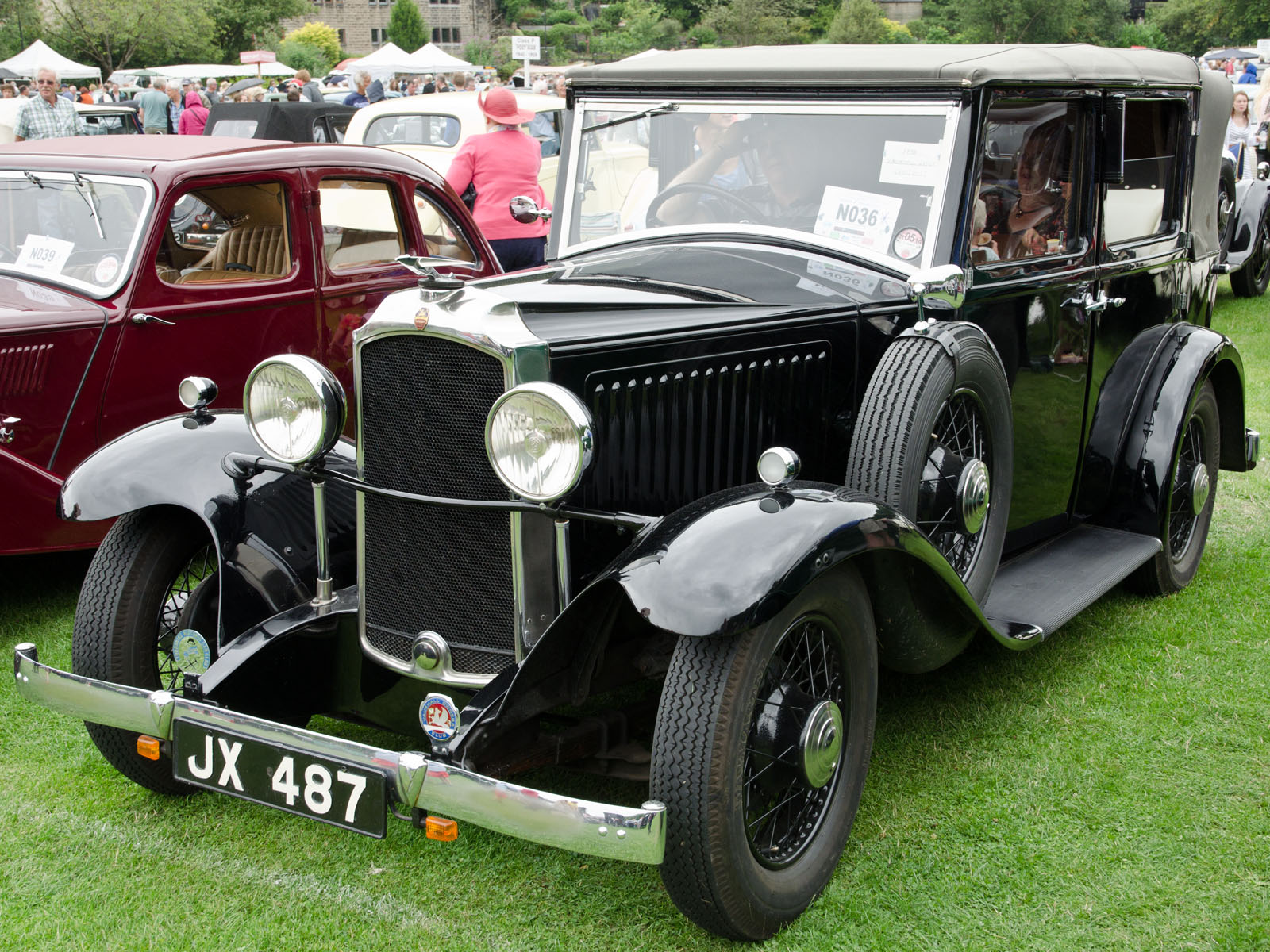 Vauxhall Cadet Cabriolet 1932(DVLA) first registered 25 February 1933, 2192ccHebden Bridge Vintage Weekend 04/08/2013